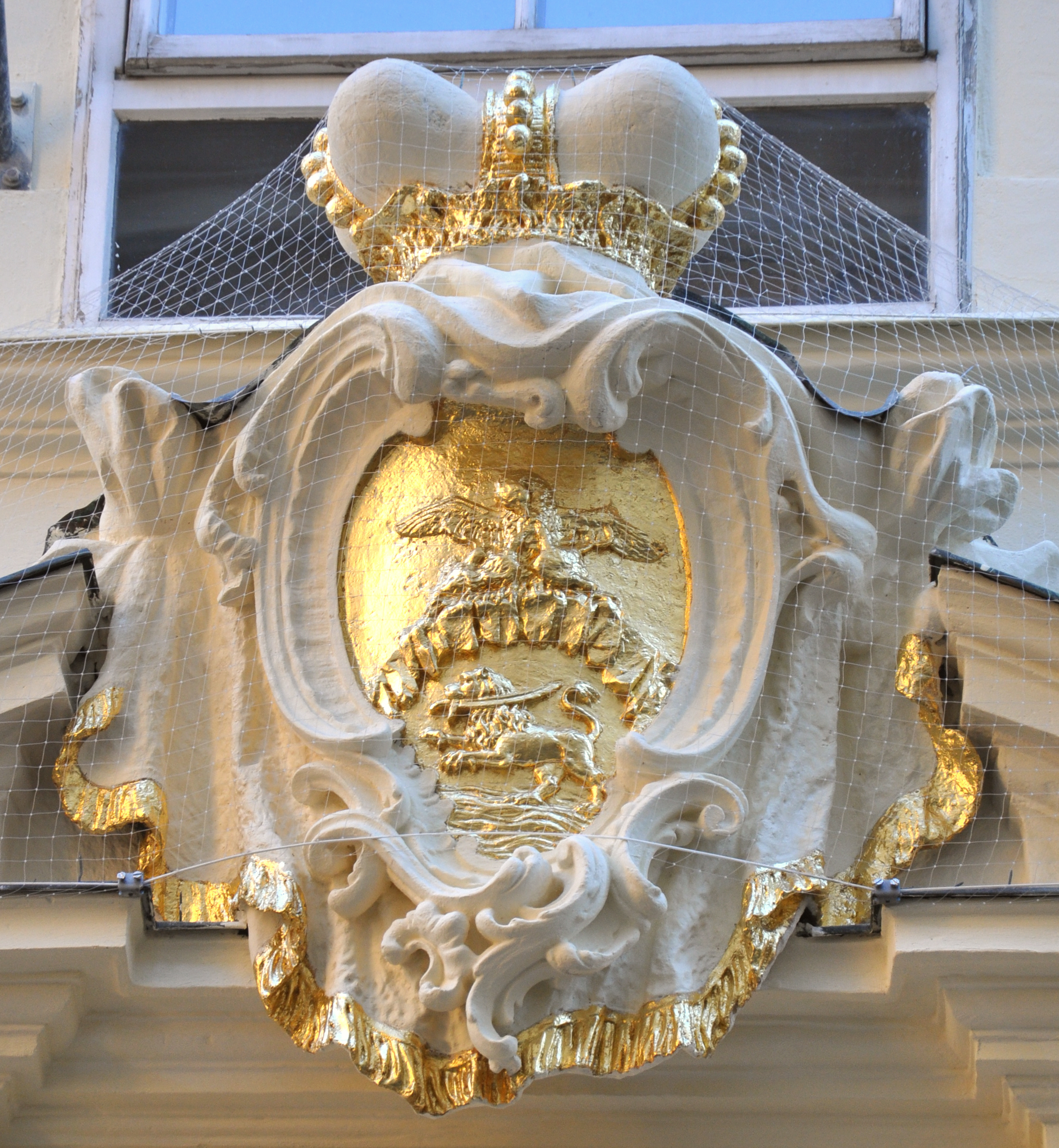 Wien, Herrengasse 19 (Palais Batthyány-Strattmann), Wappen Batthyány über dem Portal